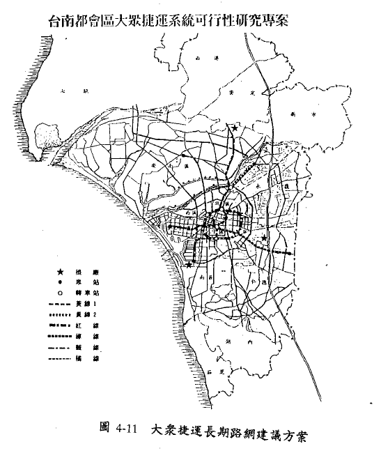 台南捷運早期的路網規畫方案之一